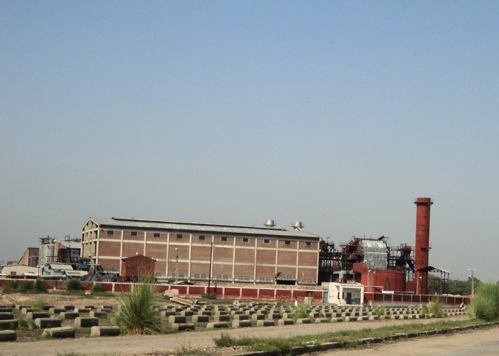 نون شوگر ملز